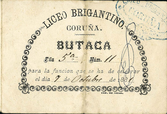 Entrada para asistir ao Liceo Brigantino da Coruña